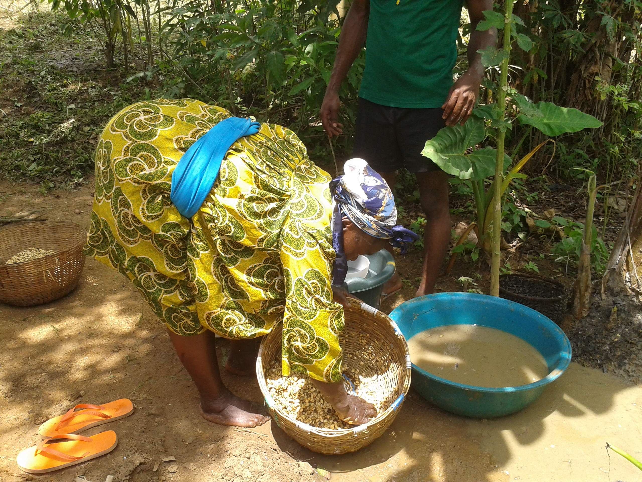 maman au village bafia en plein travail porte un CABA NKONDO This is an image of Cultural Fashion or Adornment from Cameroon